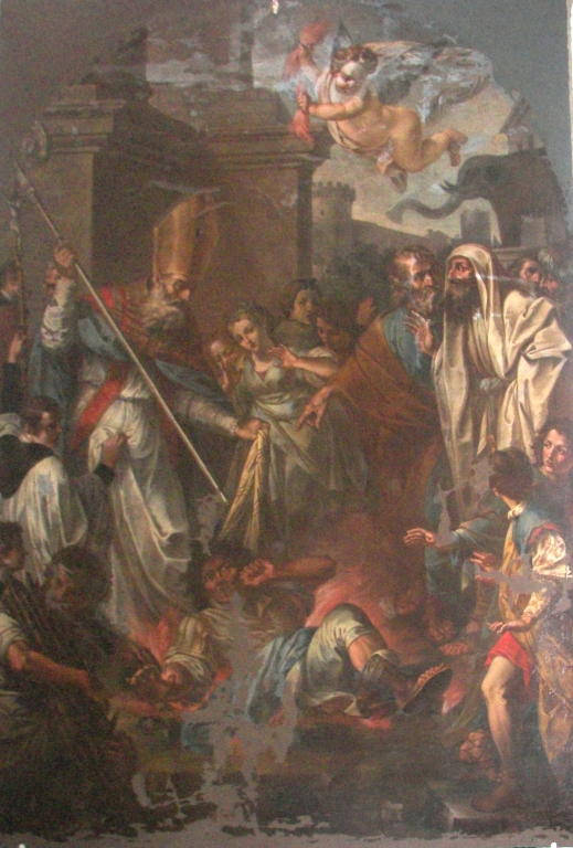 San Leone Taumaturgo che sconfigge il mago Eliodoro. Olio su tela del secolo XVIII di Matteo Desiderato. Chiesa Madre di Santa Maria di Licodia.